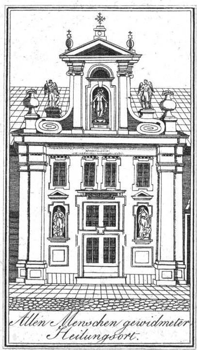 Wien-Leopoldstadt, Kloster der Barmherzigen Brüder, Taborstraße